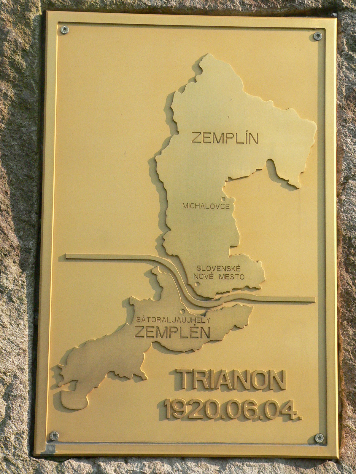 Az egykori Zemplén vármegye kettévágásának emléktáblája Sátoraljaújhelyen